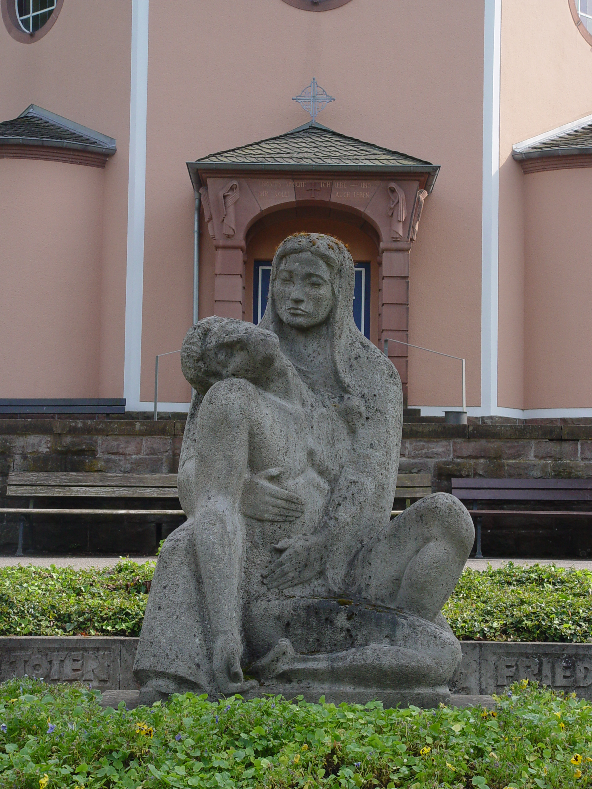 Skulptur Pietà, Friedhof Grötzingen.